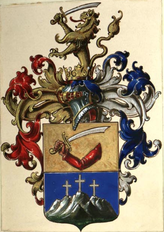 Wappen der Edlen von Cavallar nach dem Liber Regius von 1903.